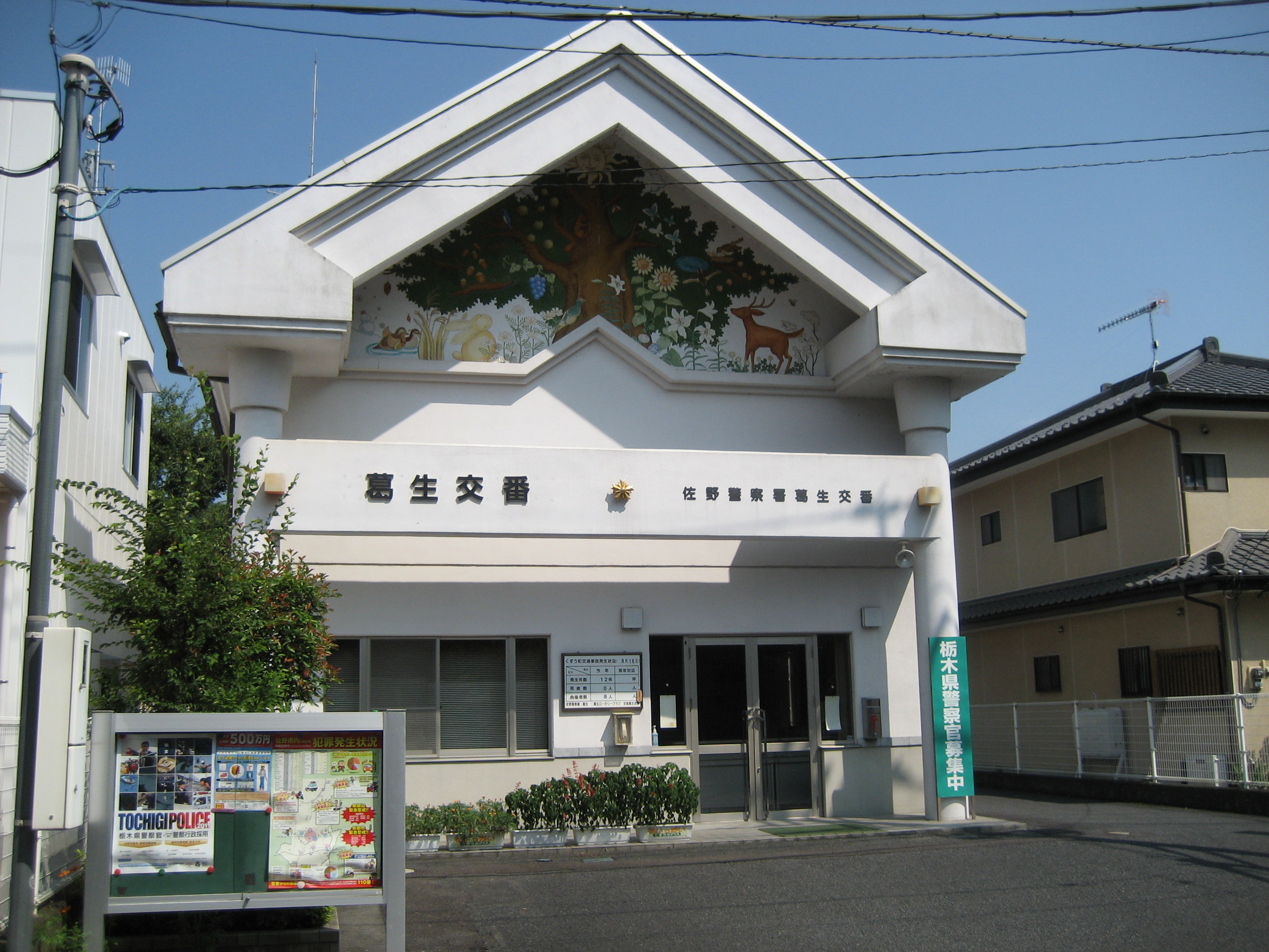 栃木県佐野警察署葛生交番庁舎